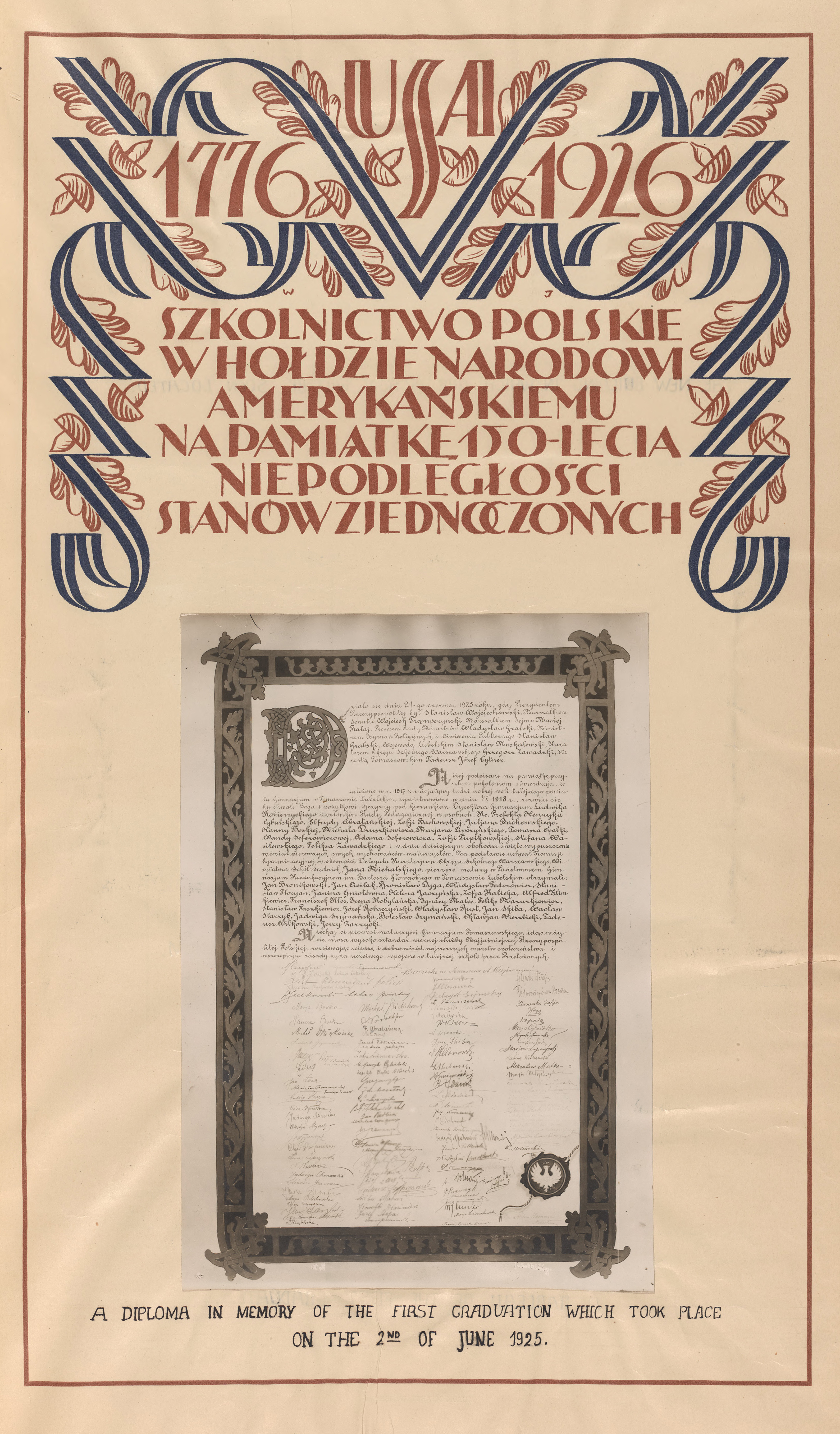 Dokument pierwszej matury Gimnazjum im. Bartosza Głowackiego w Tomaszowie Lubelskim w 1925 roku, upamiętniony w Polskiej Deklaracji o Podziwie i Przyjaźni dla Stanów Zjednoczonych w 1926 roku, w tomie 9 na stronie 7.